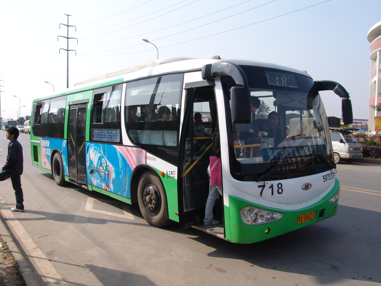 武汉公交718路，自编号507E534